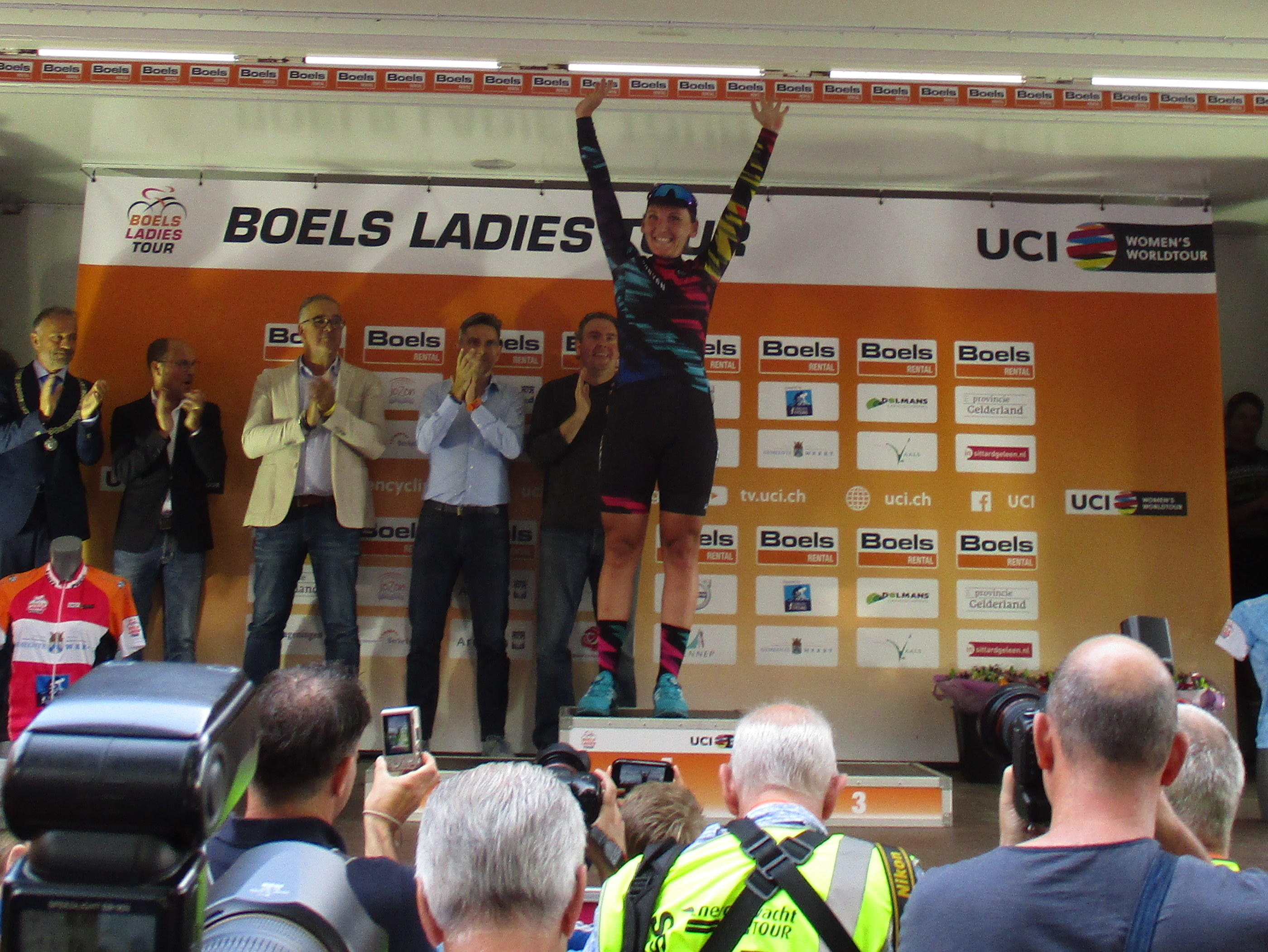 Huldiging van de winnaars van de 4e etappe van de Boels Ladies Tour 2017 in Weert.